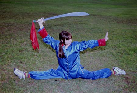 חרב רחבה של וו שו Saber (Dao)